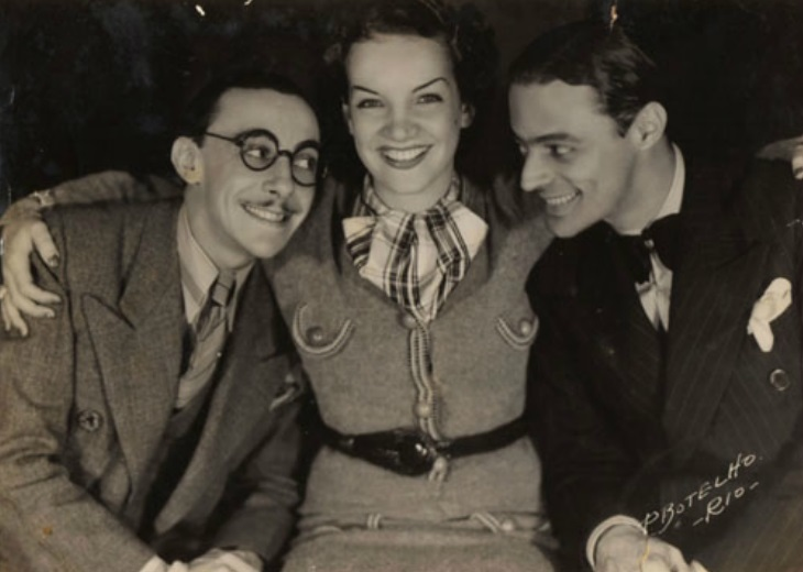 Mesquitinha, Carmen Miranda e Barbosa Júnior no filme Estudantes, 1935.